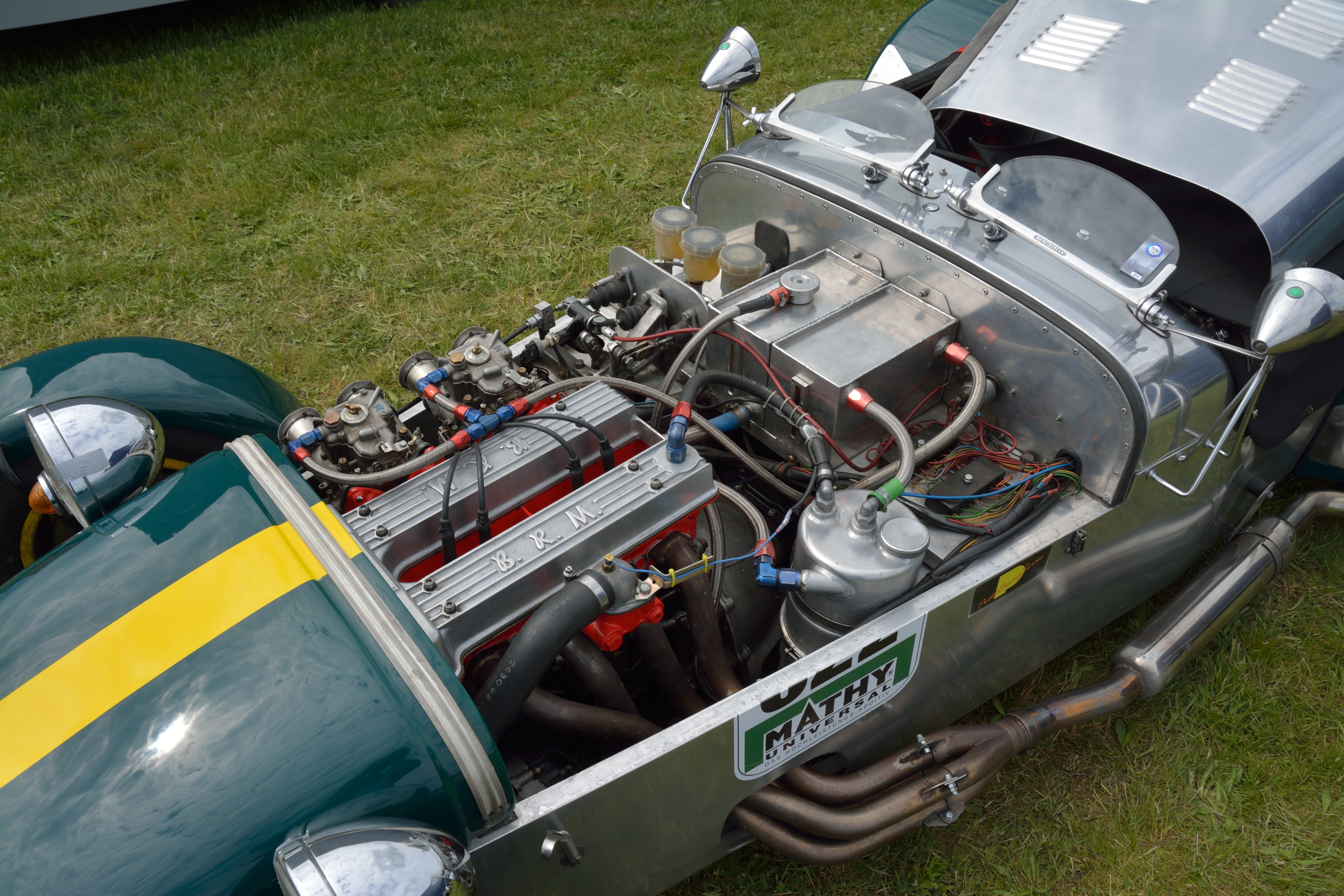 Impressionen der vierten "Classic Motor Days, Oldtimer und historische Fahrzeuge" auf dem Flugplatz Hungriger Wolf